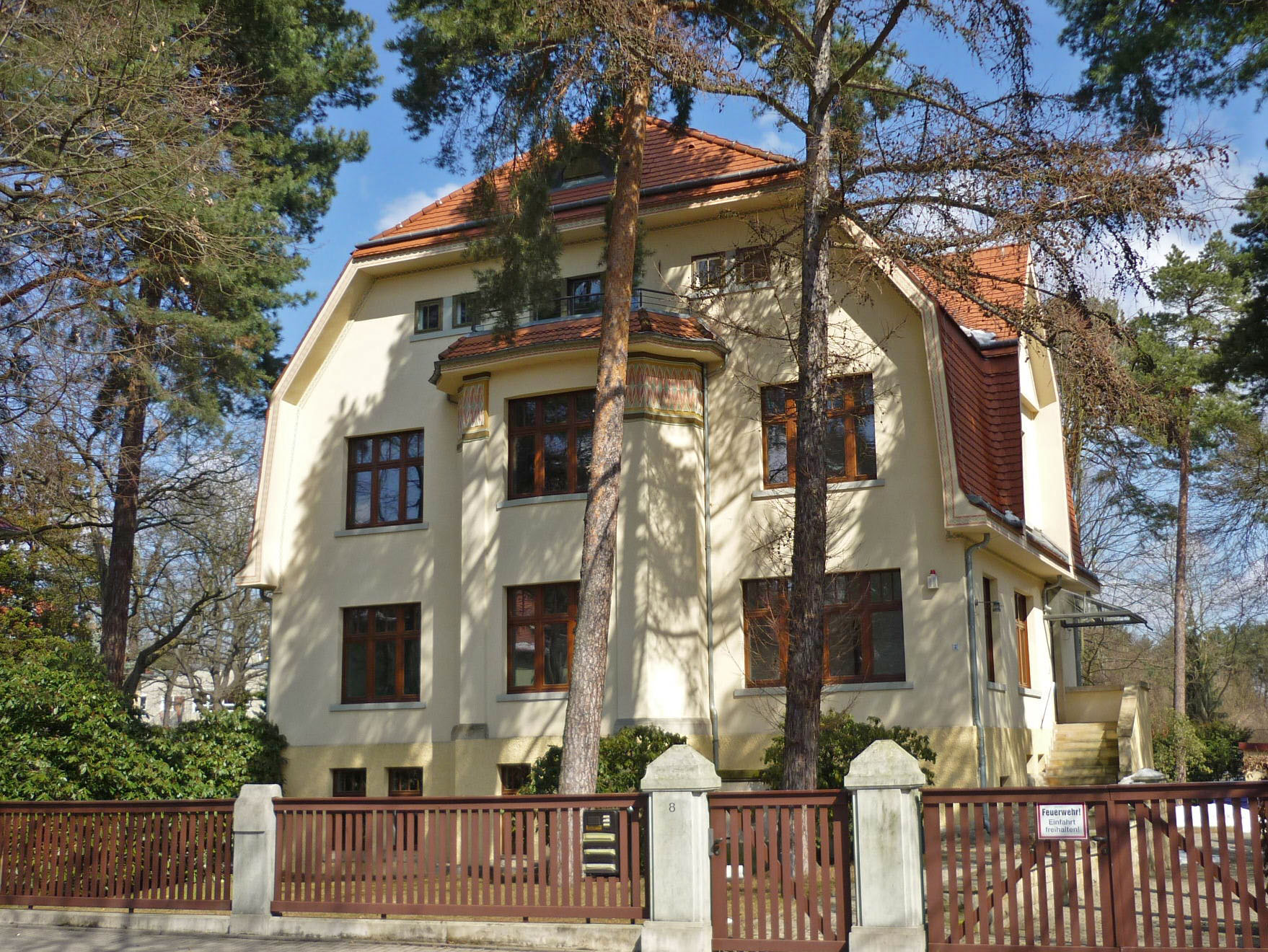 Villa Selliner Straße 8 in Dresden-Klotzsche